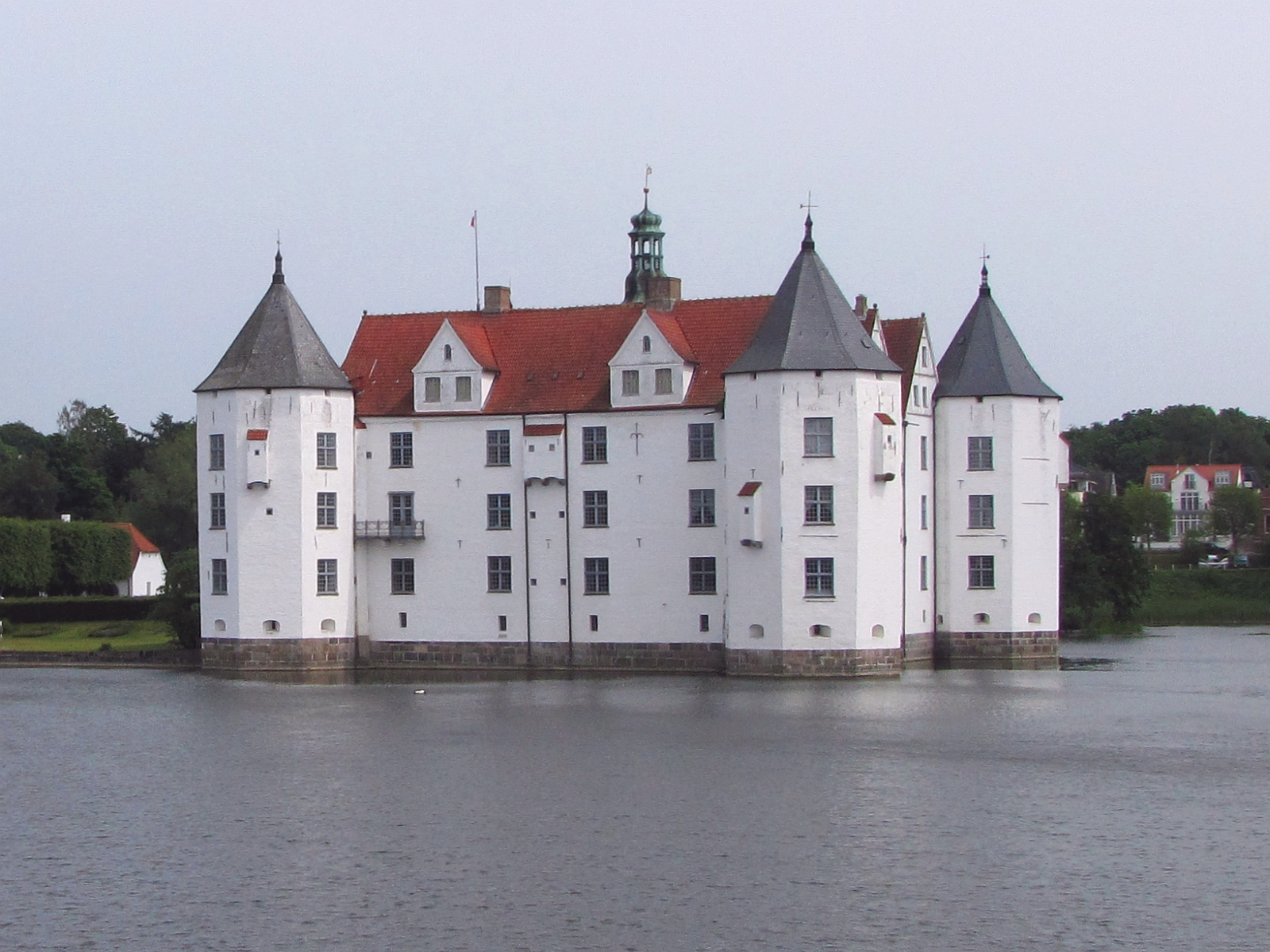 Kulturdenkmal Schloss Glücksburg 4.1b Wasserschloss Ansicht von Westen - Schleswig-Holstein Foto 2012 Wolfgang Pehlemann Steinberg/Ostsee IMG 8070